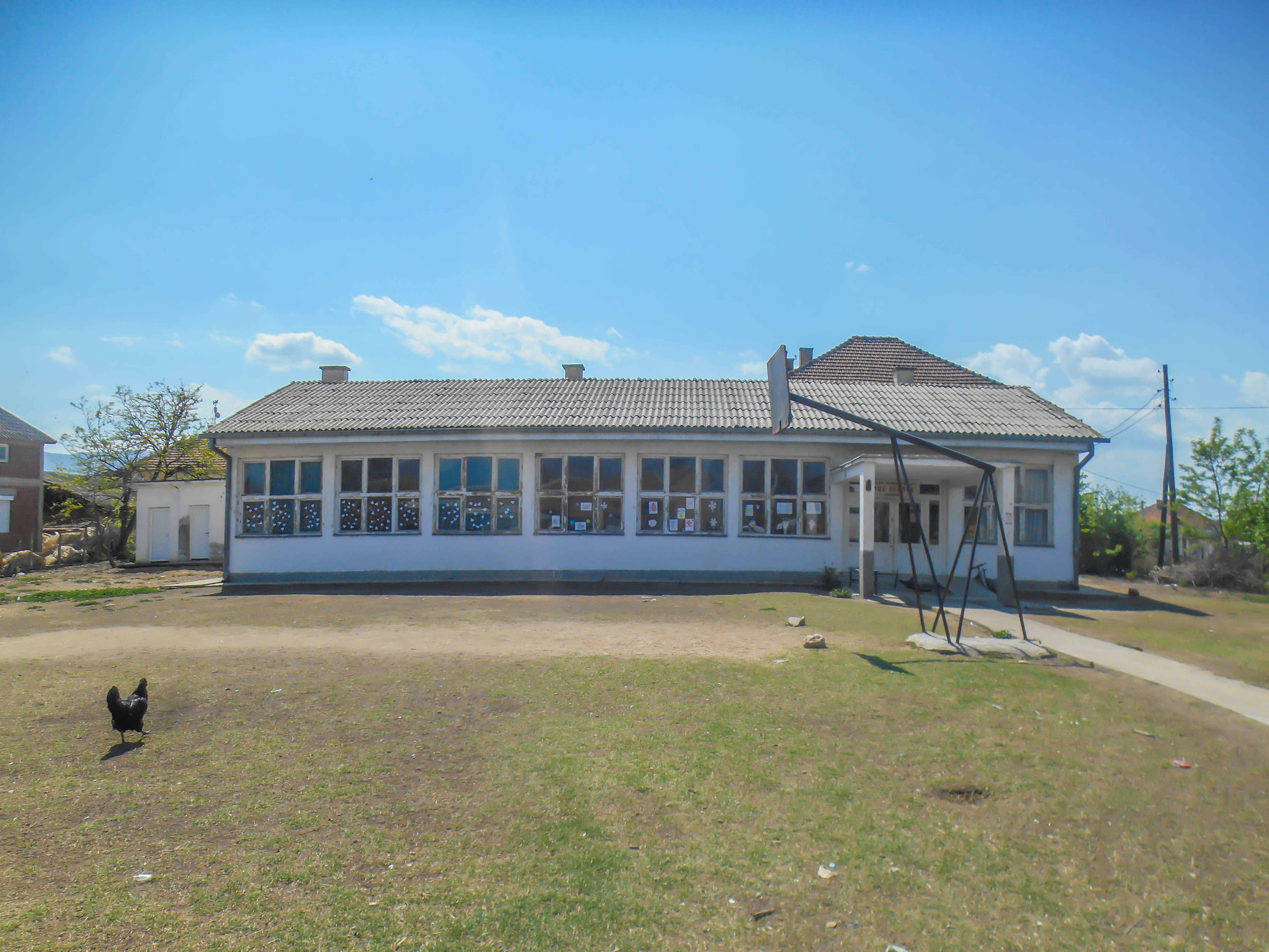 Основно училиште „Гоце Делчев“ - Еднокуќево